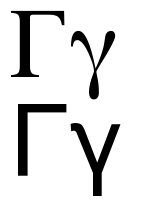 greek letter gamma